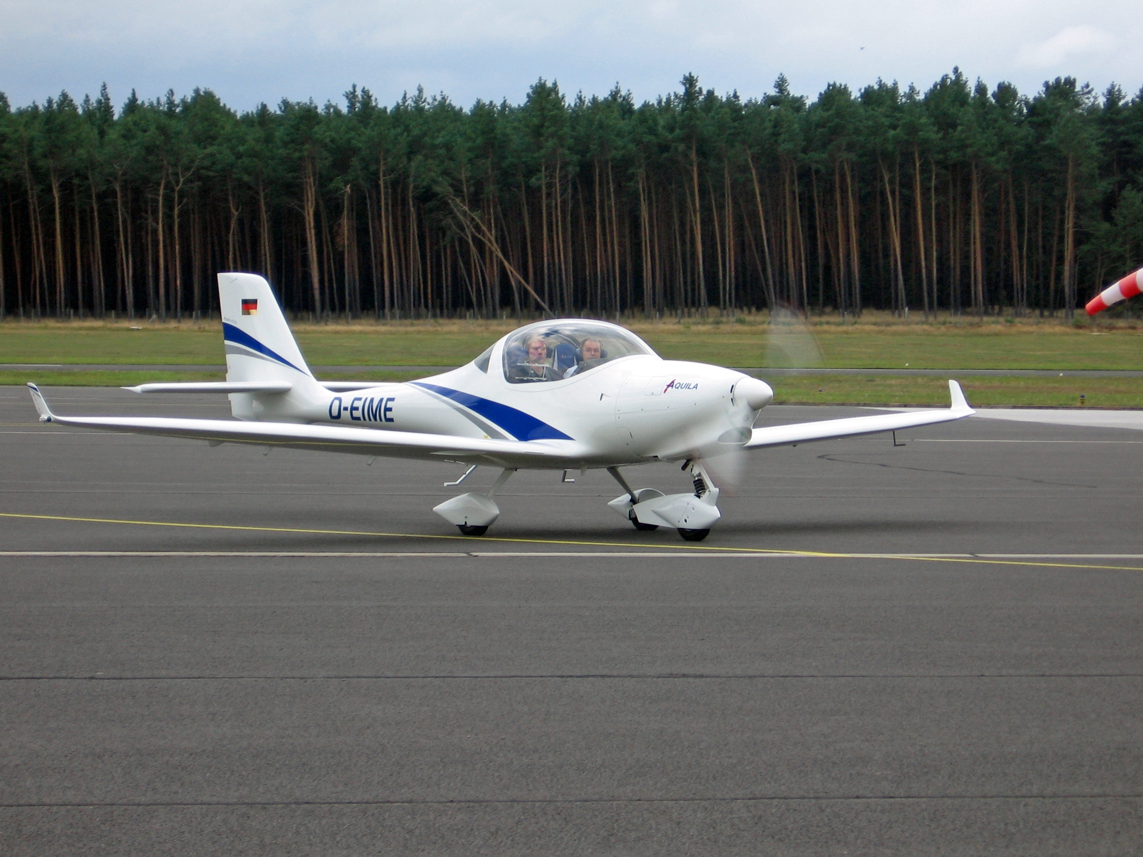 Zweisitziges Motorflugzeug des Typs Aquila A210